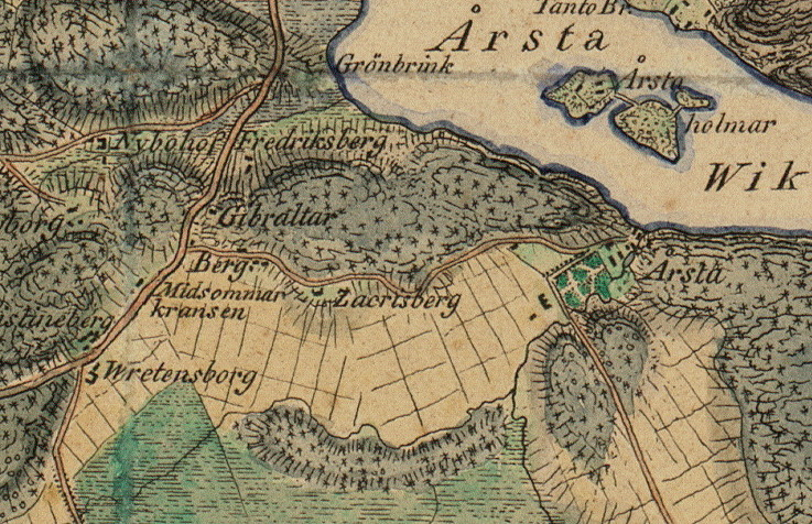 DEL AV KARTA: Stockholm med omgivningar 1817. Karta öfver Belägenheten omkring Stockholm / utgifven af W. M. Carpelan 1817.